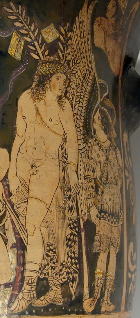 Uomo coronato di mirto, 330 a.C. Immagine originale presente su Commons.